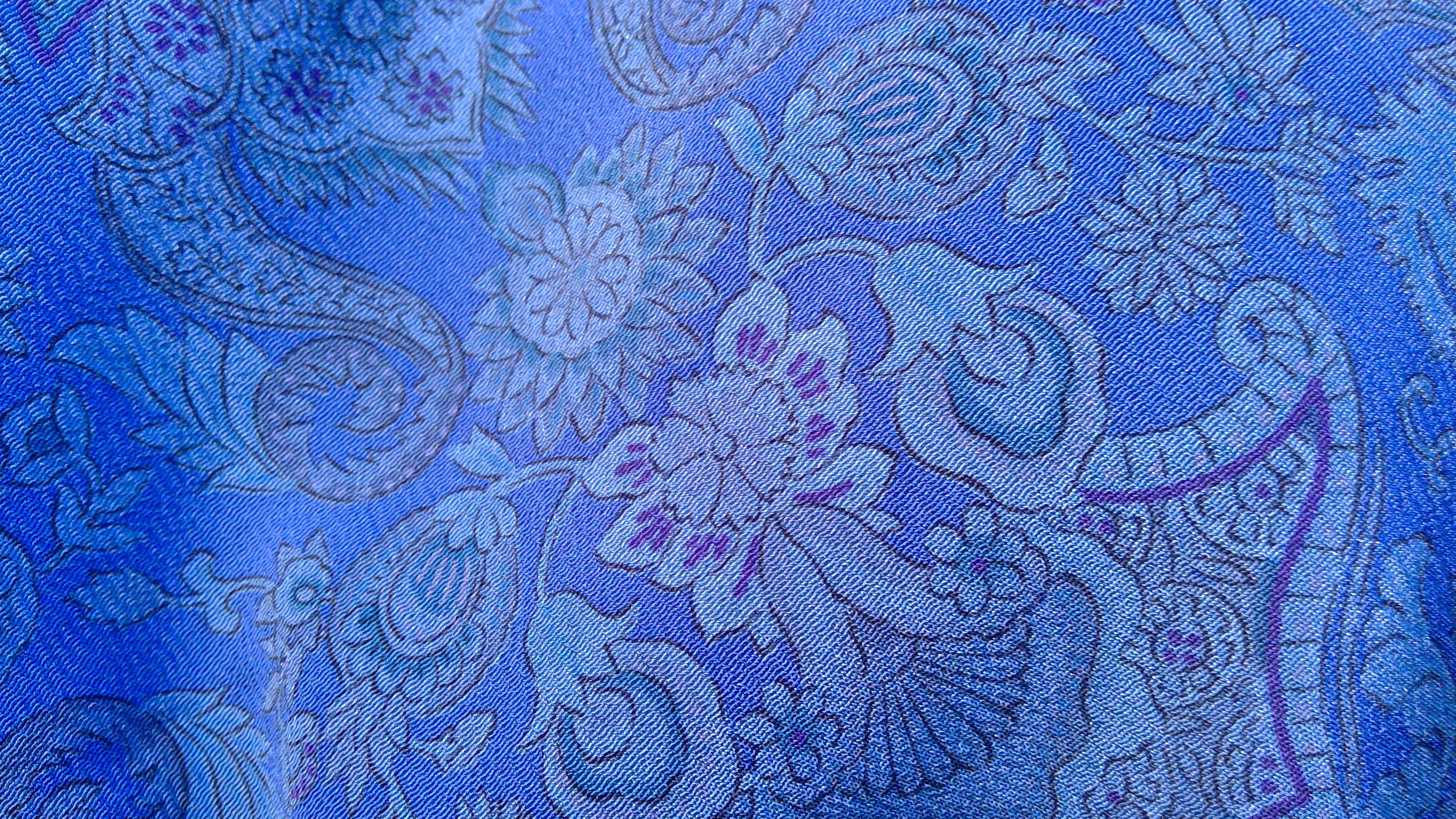 丹後ちりめん（ジャカード織）の染色後の布地